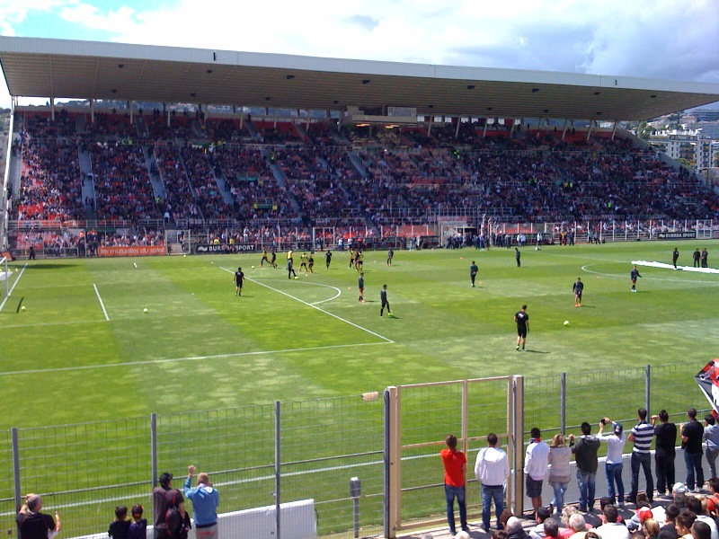 Le Stade du Ray. La tribune présidentielle lors de la rencontre OGCN-OL le 19 mai 2013.